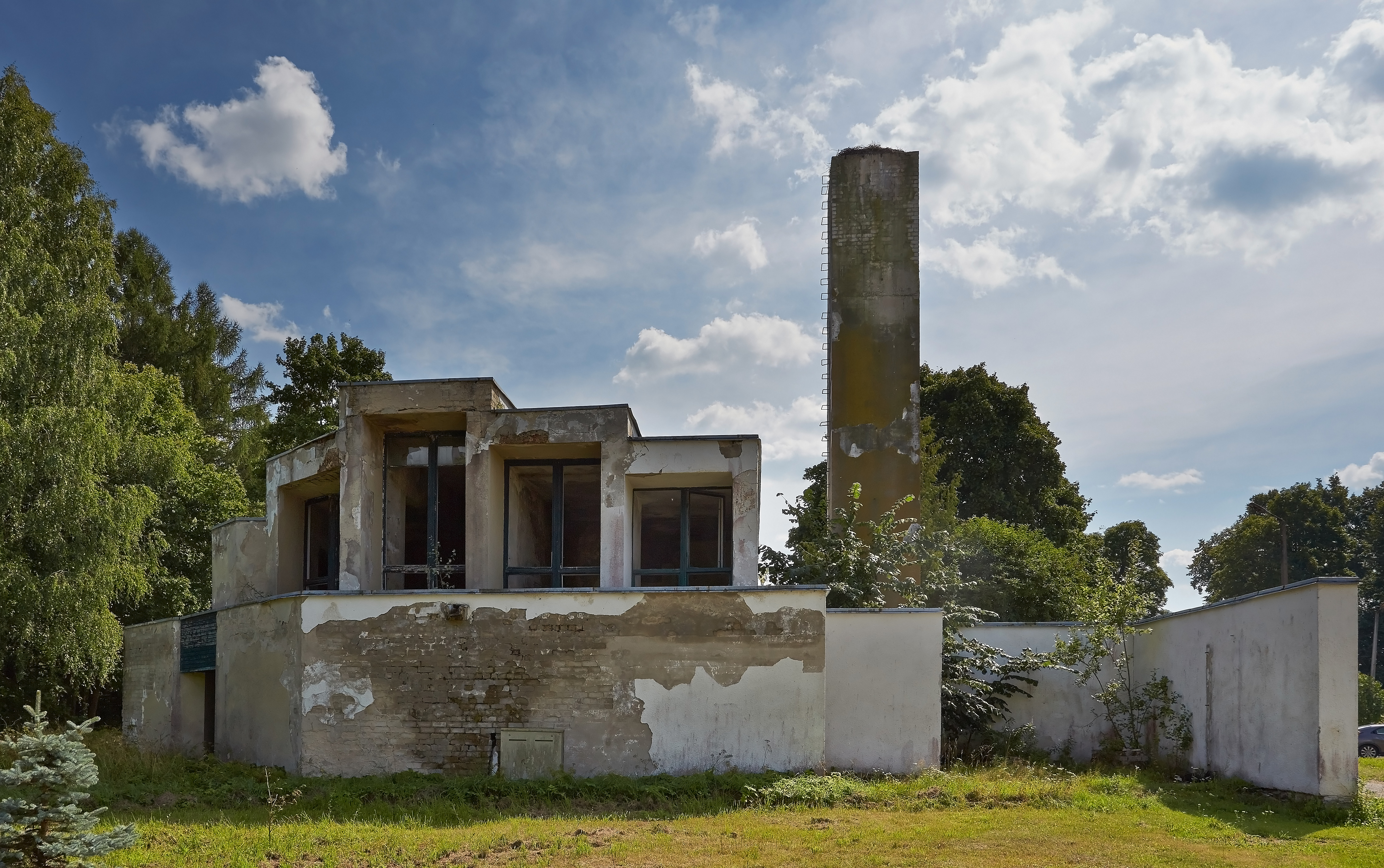 Tsooru kolhoosikeskus